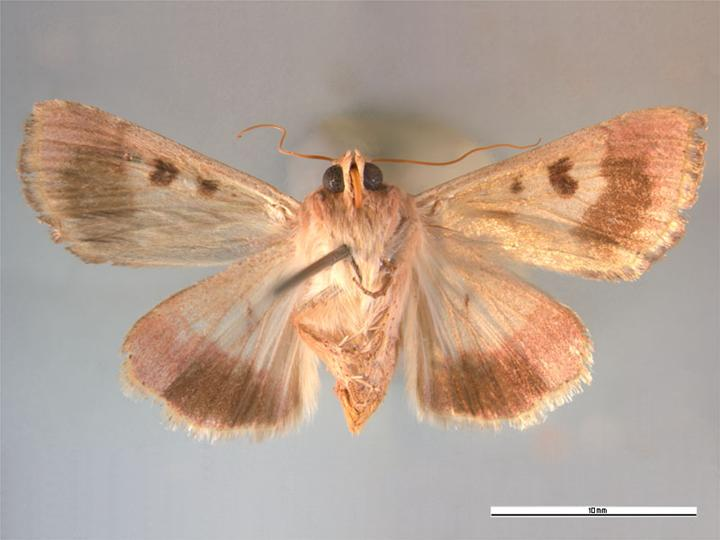 Helicoverpa armigera ventral view